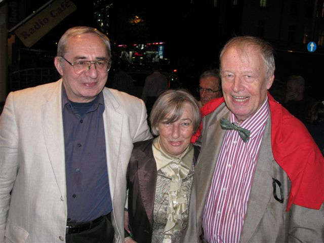 Leszek Sankowski and Teresa Torańska (1944-2013), Polish journalist and Maciej Morawski (b. September 20, 1929 in Poznań, Poland), Polish journalist (Radio Free Europe).